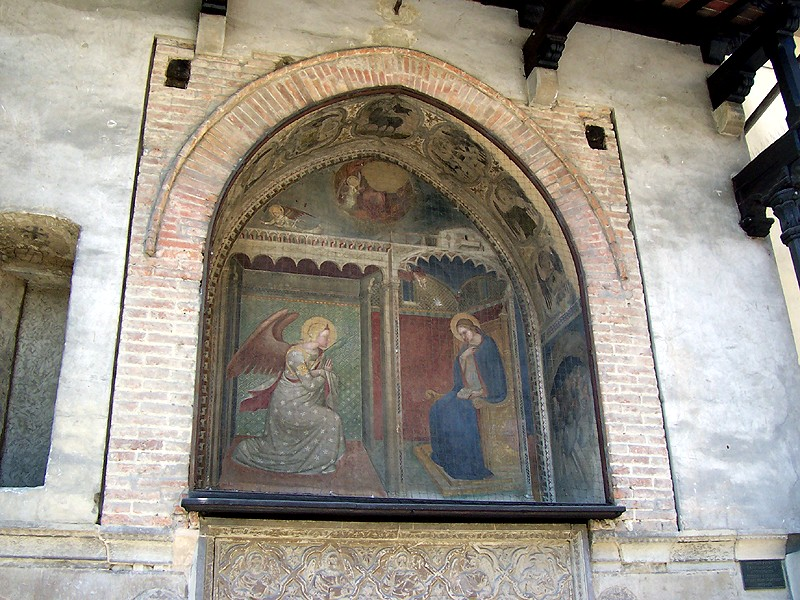 Arezzo - Chiesa della Ss. Annunziata (affresco con l'Annunciazione, di Spinello Aretino)